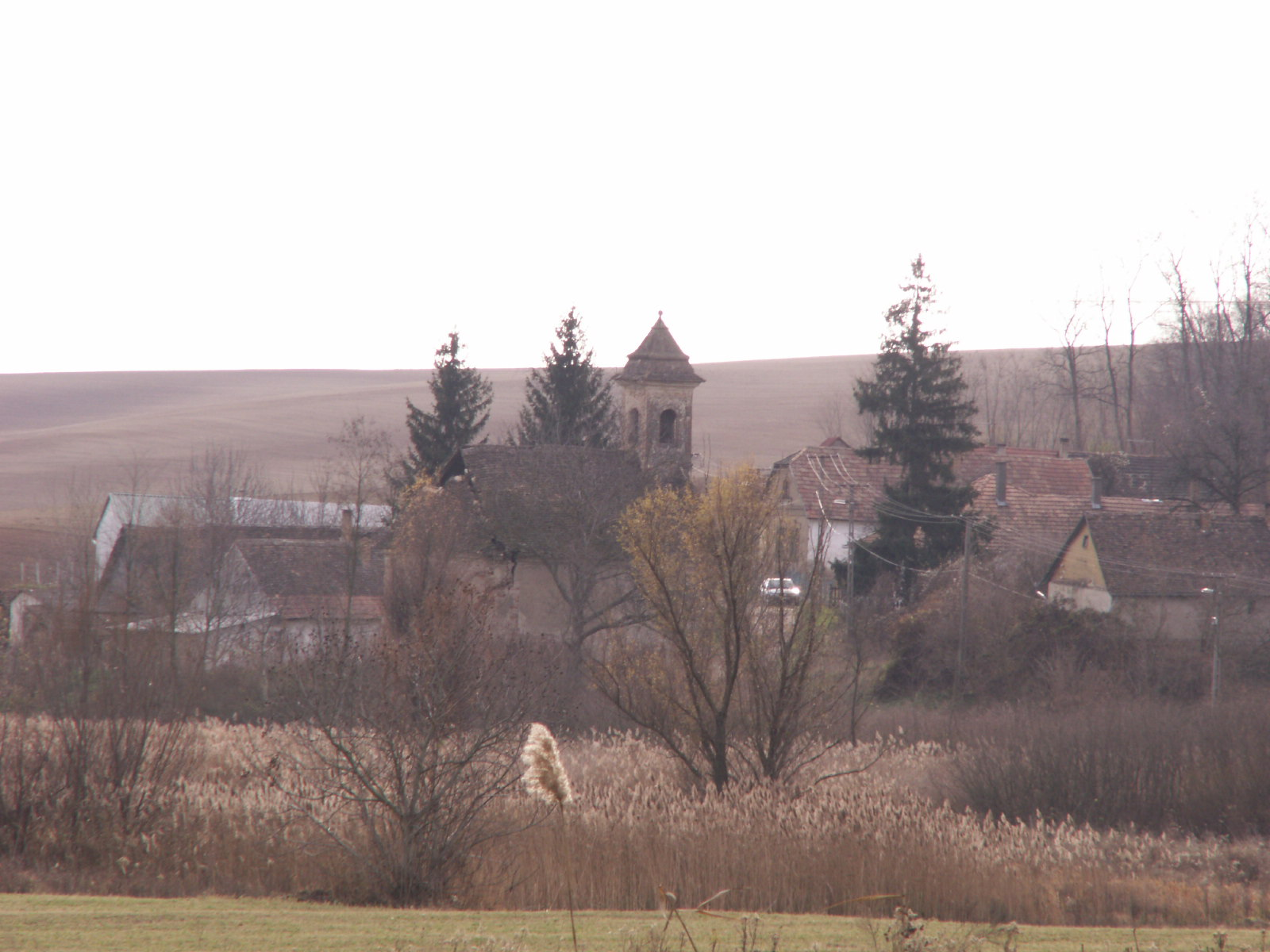 Ez a kép Tevel község Kovácsi (Tevel) községrészét mutatja.